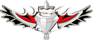 Yahalom Unit Pin